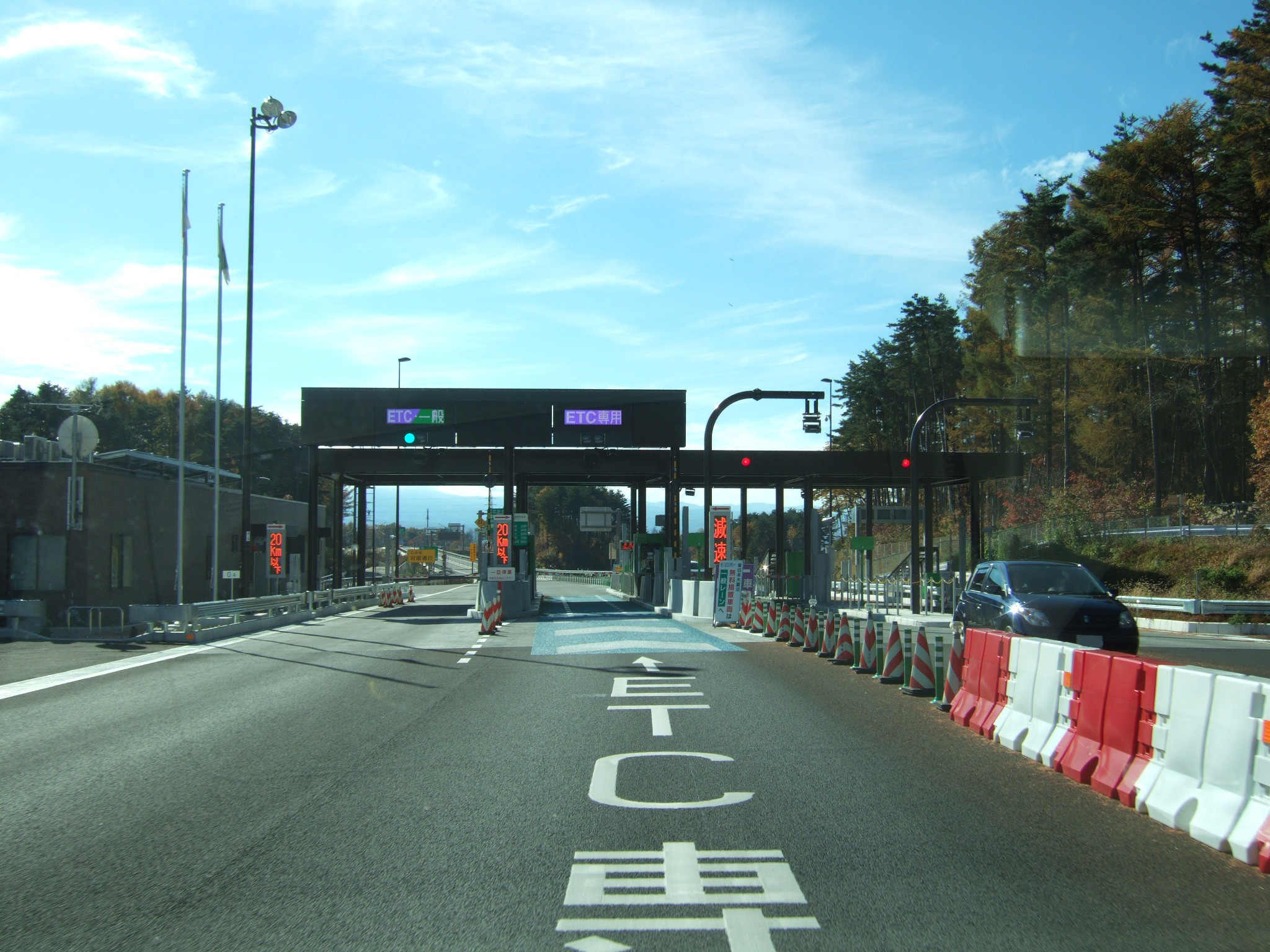 中部横断自動車道 小諸御影料金所